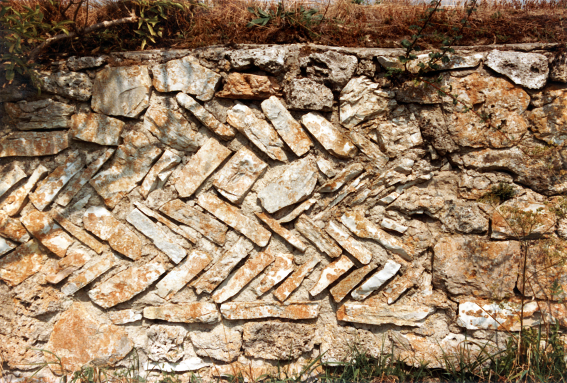 Römisches Fischgrätmuster (Opus spicatum) auf der Innenwange der Nordmauer des spätantiken Burgus am Kastell Abusina (Eining) an der Donau, Bayern, Deutschland. Zustand im Sommer 1983.